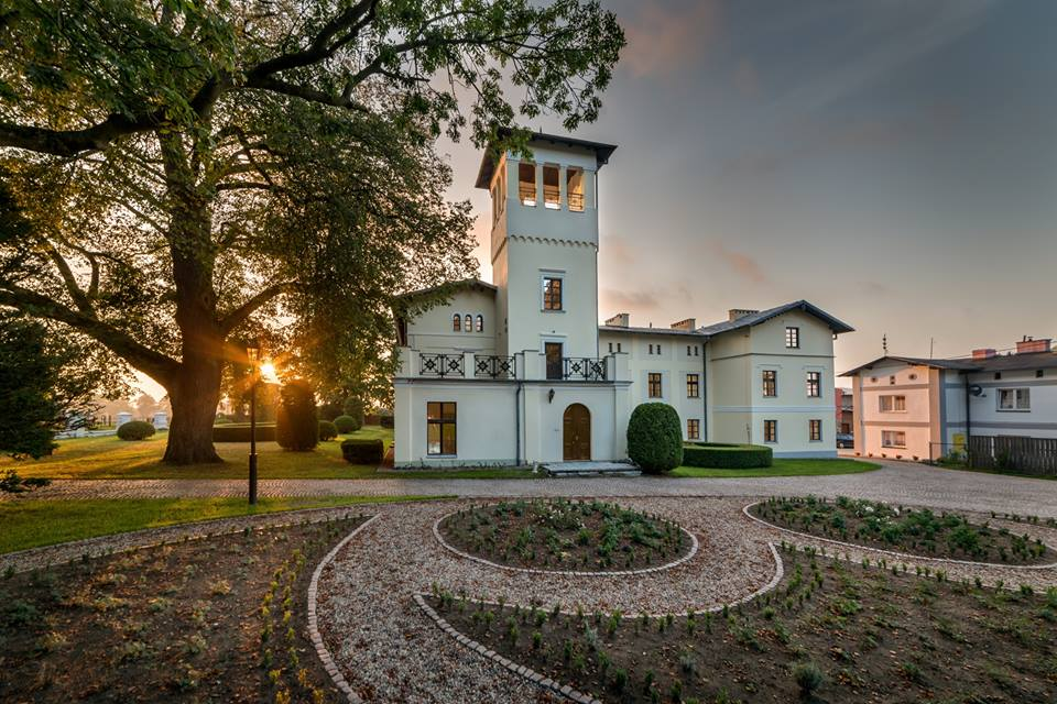 Herrenhaus in Klanin